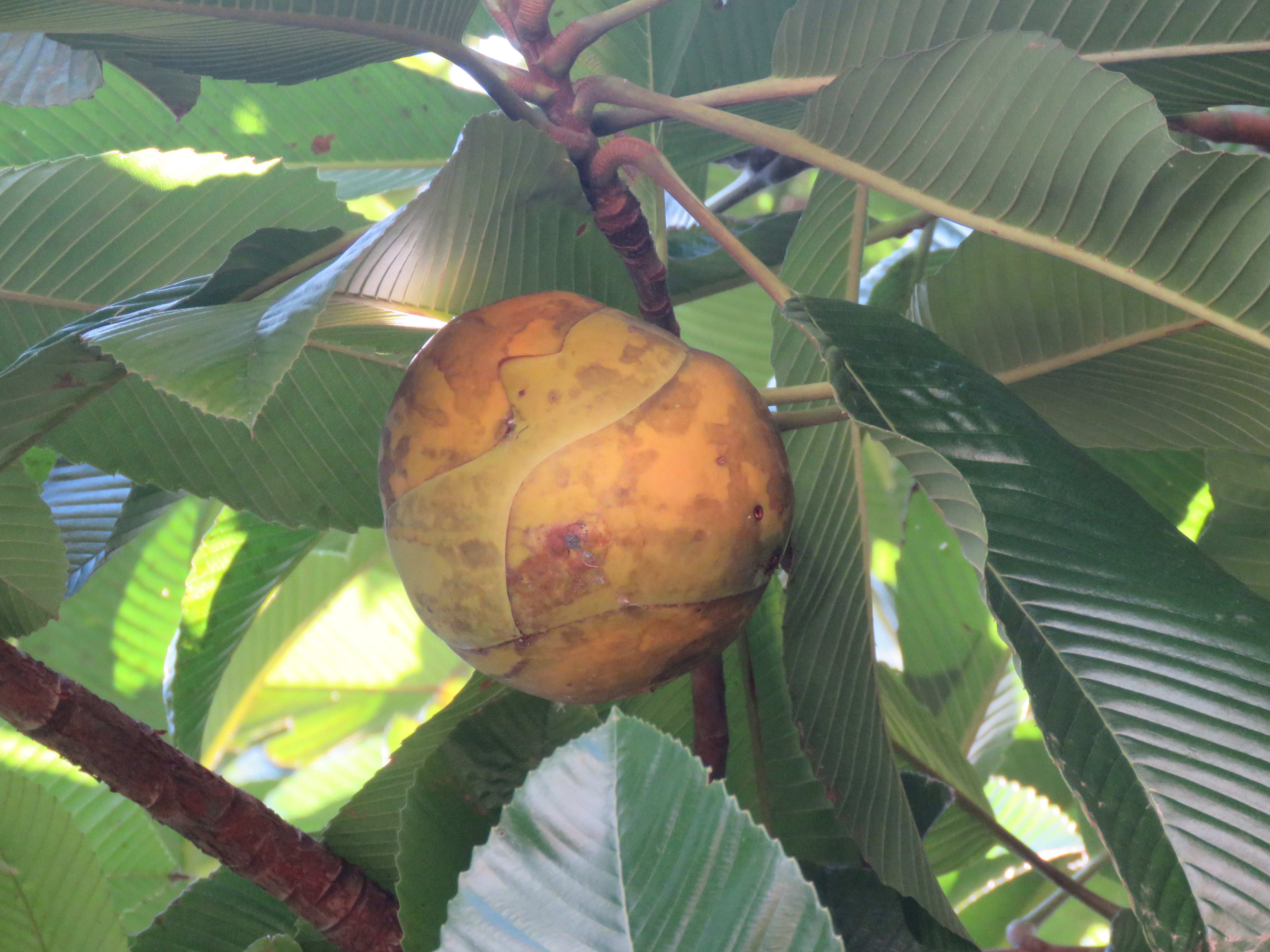 Photos by Vinayaraj